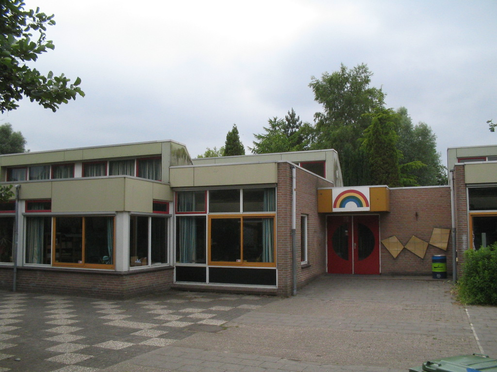 basisschool in Tanthof, Delft (..de Regenboog..) eigen foto M.Minderhoud